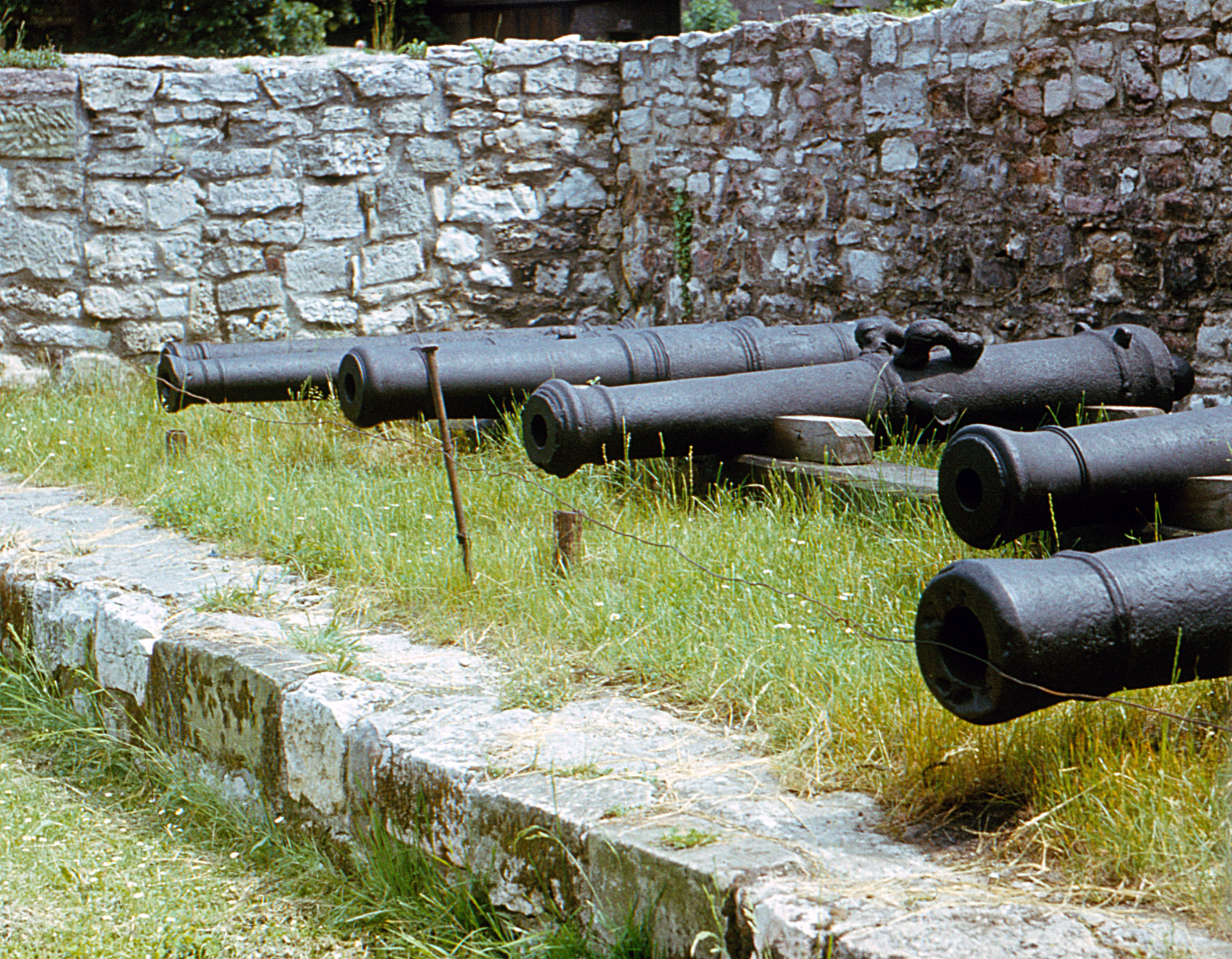 Die Kanonen der Burg Querfurt sind 1981 durch einen verrosteten und ungespannten Draht vor dem Zutritt gesichert.